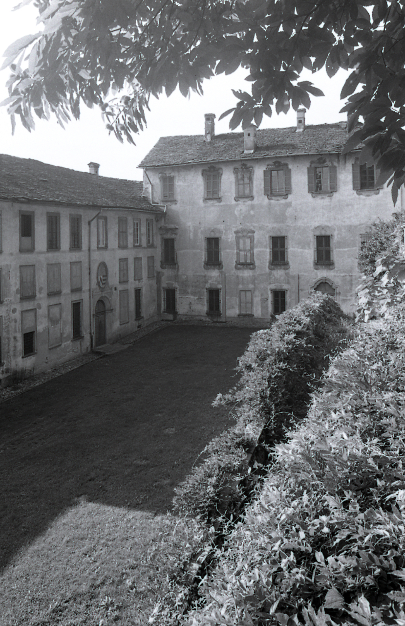 Servizio fotografico : Nonio, 1980 / Paolo Monti. - Strisce: 7, Fotogrammi complessivi: 36 : Negativo b/n, gelatina bromuro d'argento/ pellicola ; 35 mm. - ((Sul portanegativi: N[I]K[MA]T-EL FP4. - Occasione: Documentazione per la pubblicazione: Alberti Luigi, Rainaldi Giancesare, Rizzi Enrico (a cura di), "Elogio del Lago d'Orta", Anzola d'Ossola-Valstrona, Fondazione arch. Enrico Monti-Lo Strona, 1983. - Fonte: Fattura di Paolo Monti: IV. Commesse/ Fattura n. 06/ Riprese fotografiche città d'Orta e Lago d'Orta (1981/04/10), presso Archivio Paolo Monti. N. 450 fotografie formato 24x30. - Fonte: Monografia di Alberti Luigi, Rainaldi Giancesare, Rizzi Enrico: Elogio del Lago d'Orta, Anzola d'Ossola-Valstrona, Fondazione arch. Enrico Monti-Lo Strona (1983). Alberti Luigi, Rainaldi Giancesare, Rizzi Enrico (a cura di)